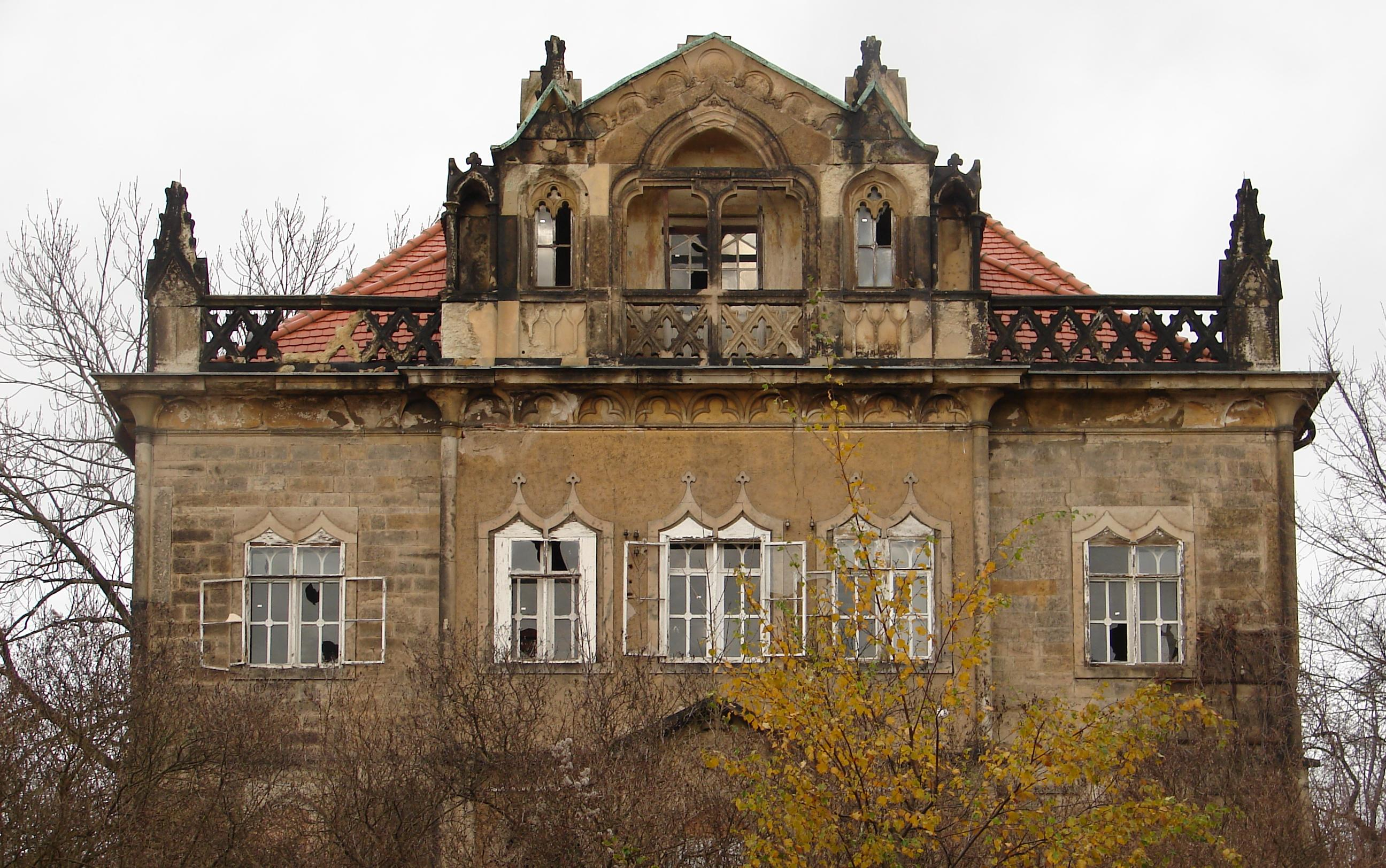 Waldschlösschen in Dresden Ende 2007, vor der Sanierung